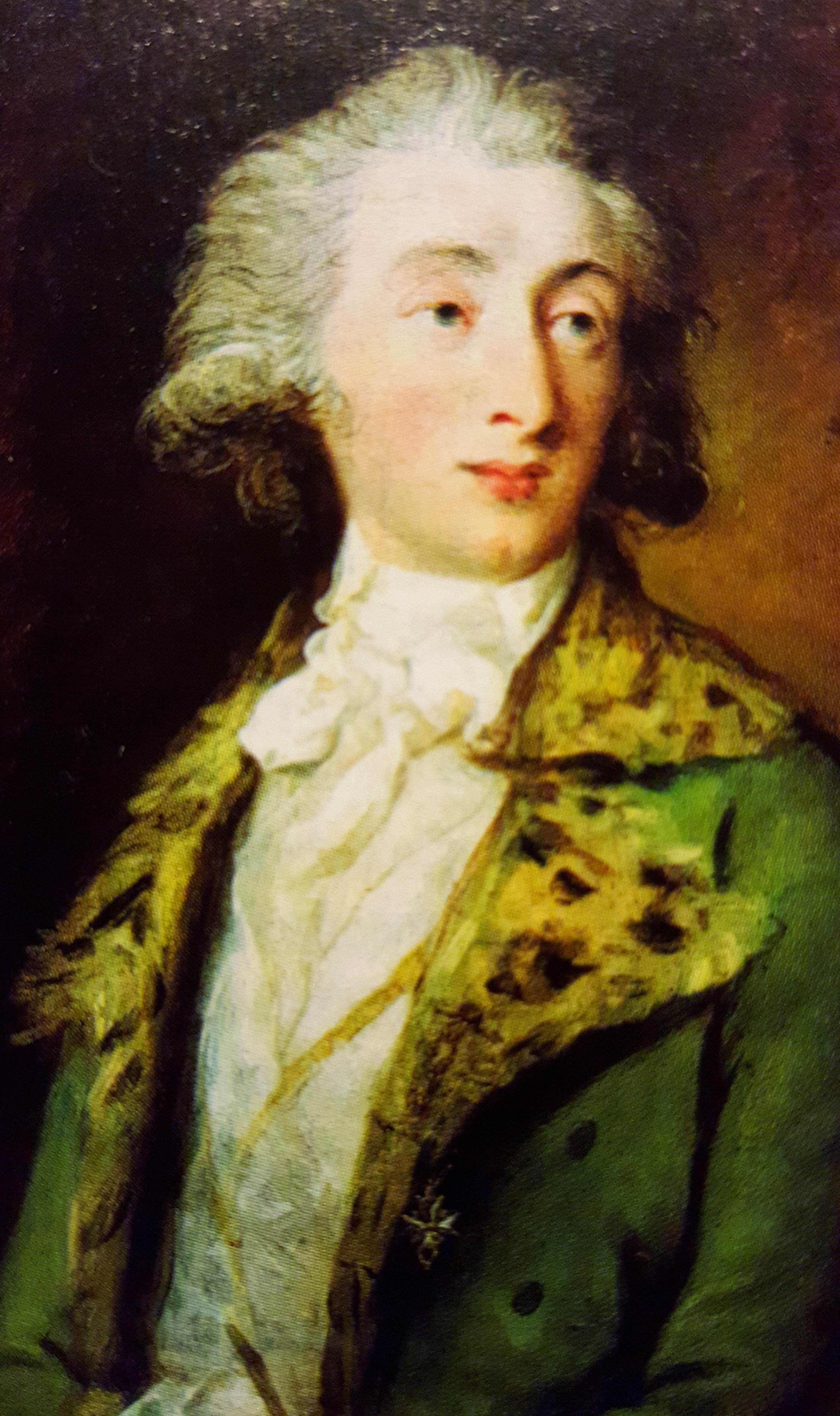 Portret Carla Bacha z ok. 1780, Muzeum Narodowe we Wrocławiu, malarz nieznany.